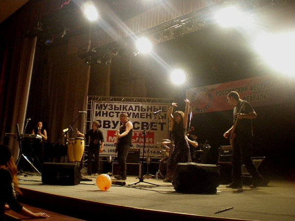 Гран-при фестиваля 2006 года группа «Дом художника», г. Рязань